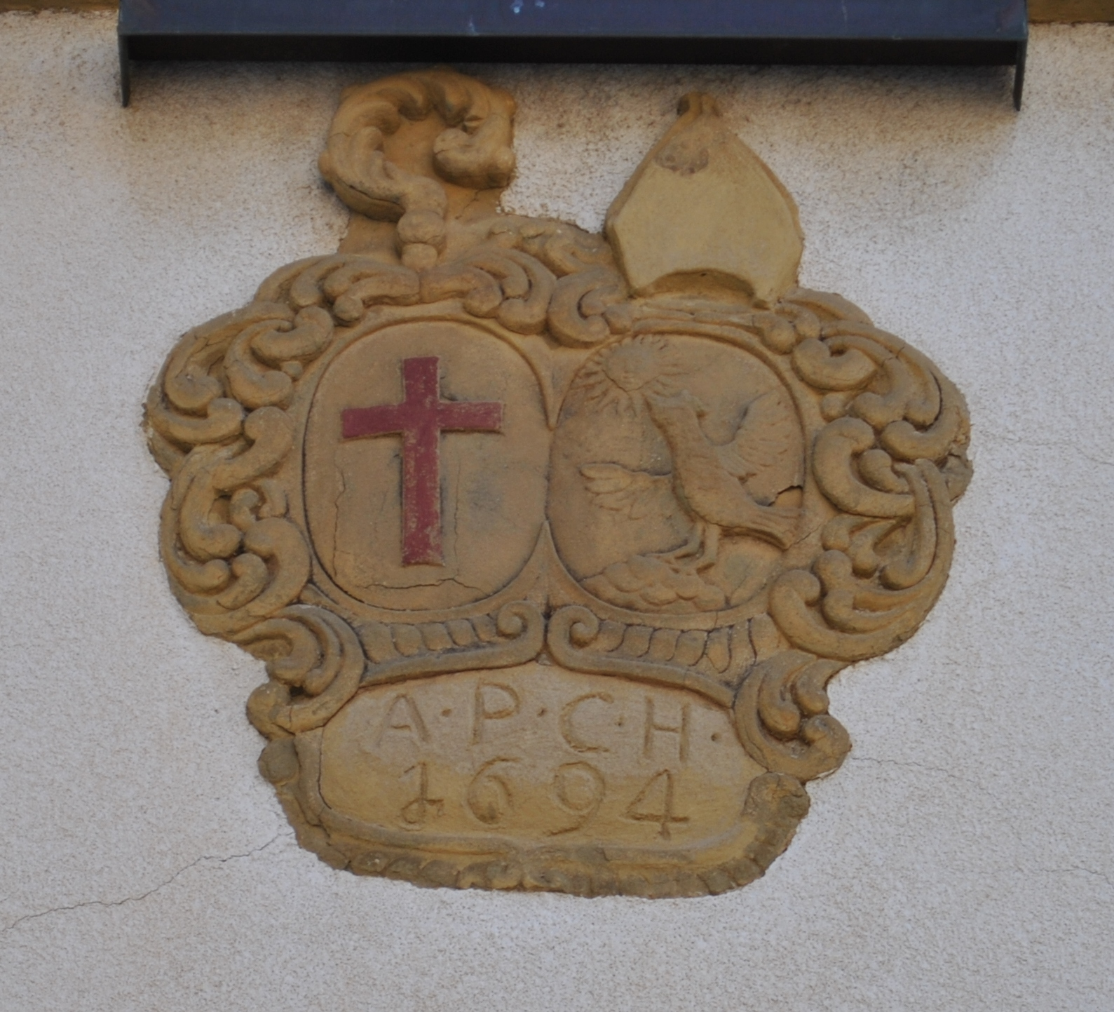 Pfarrhaus Zweigeschossiger, verputzter Walmdachbau über Hakengrundriss, mit geohrten Fenstergewänden; bezeichnet mit „1694“ Einfriedung, Bruchsteinmauerwerk, wohl gleichzeitig D-6-78-196-4